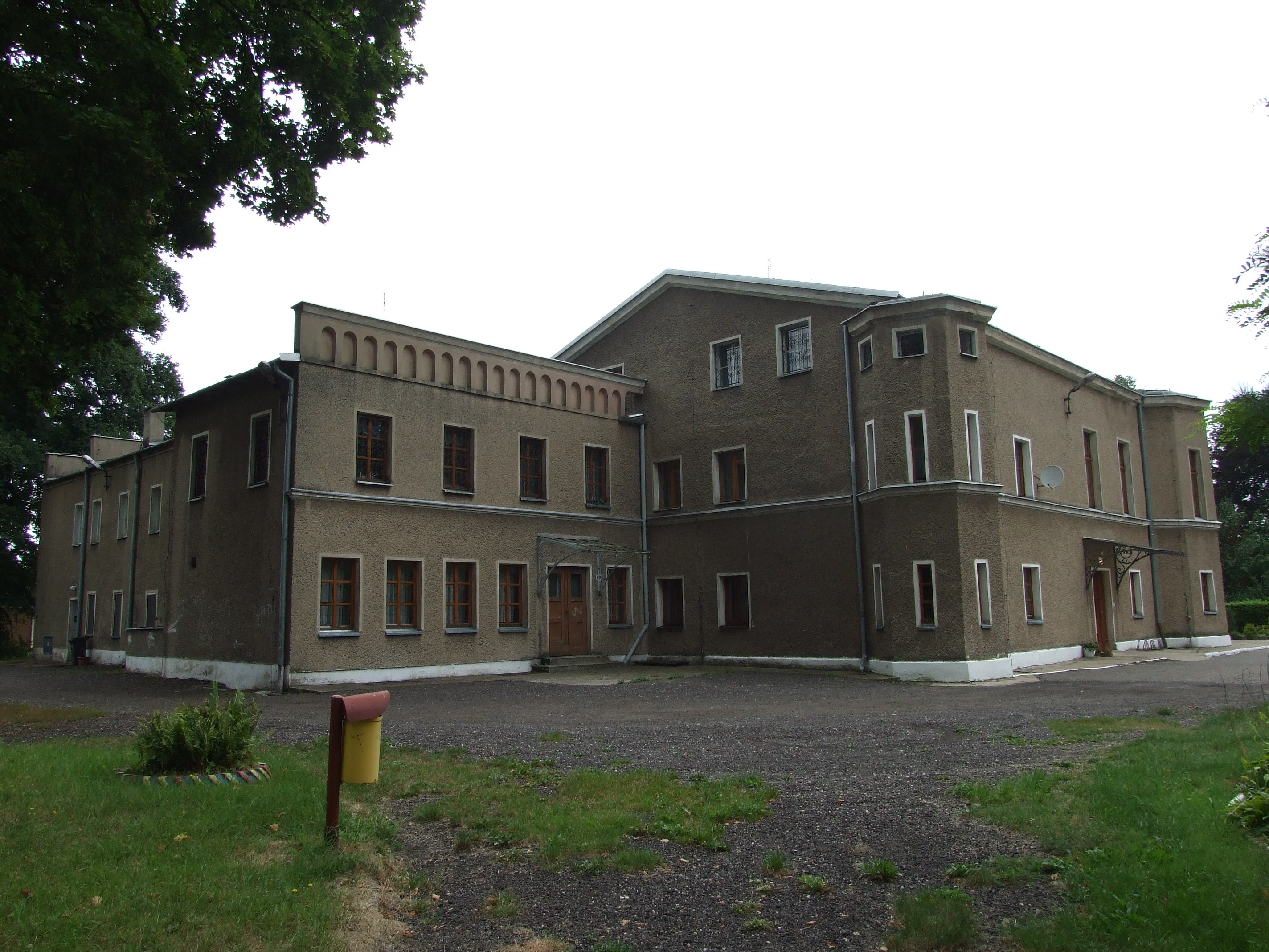 Państwowy Dom Dziecka w Sowczycach